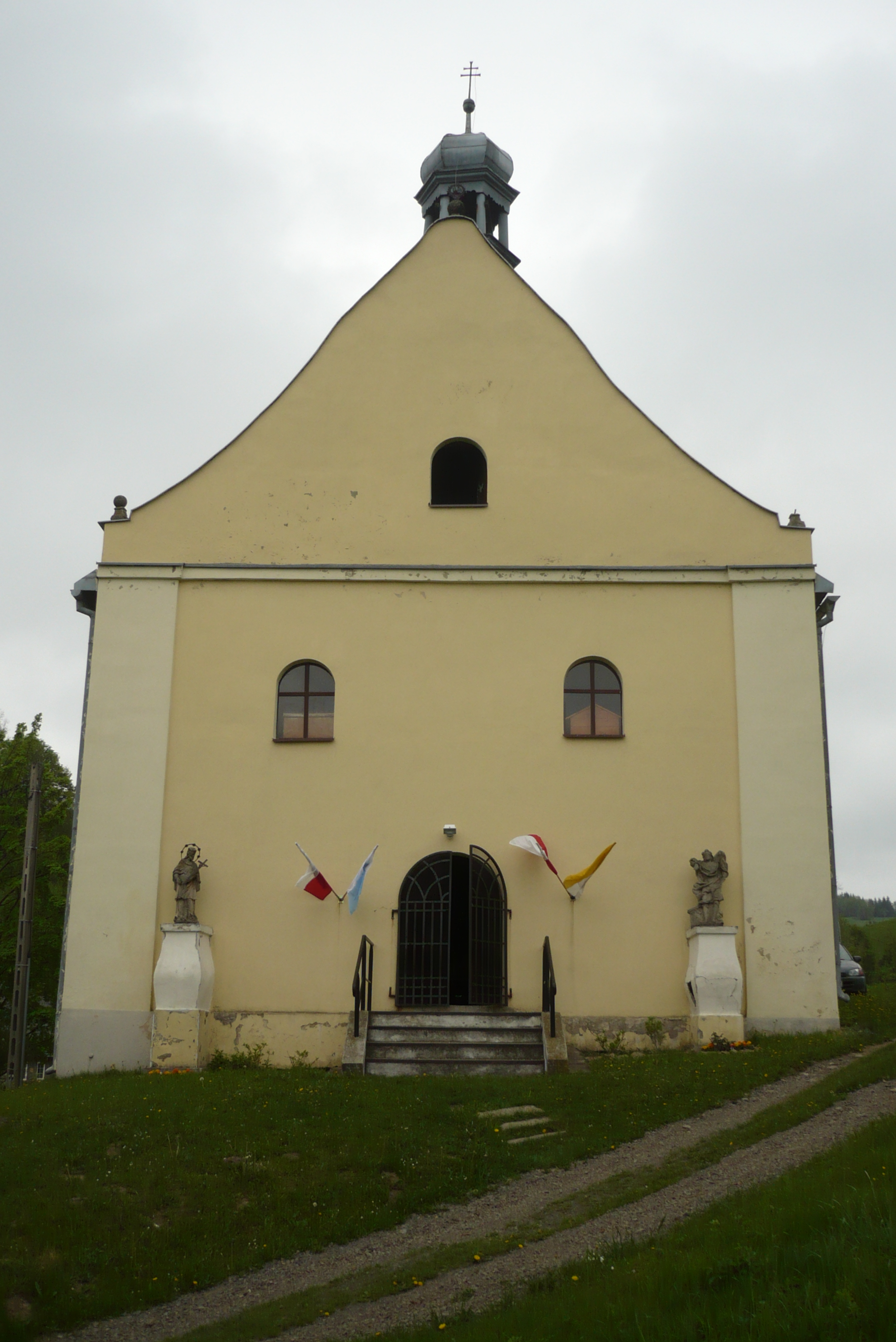 Lutynia - pierwotnie kościół pw. św. Barbary, od 1964 rzymskokatolicki kościół filialny pw. św. Jana Nepomucena, 1784